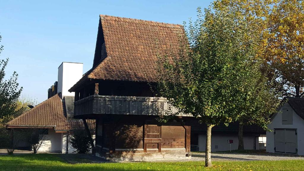 Buchs AG, Speicher beim Dorfmuseum